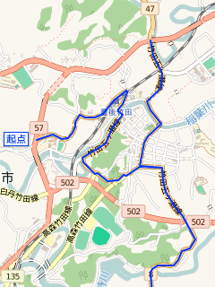 大分県道・熊本県道・宮崎県道8号竹田五ヶ瀬線 路線図 竹田市内 （OpenStreetMapの画像を一部修正） This map may be incomplete, and may contain errors. Don't rely solely on it for navigation.